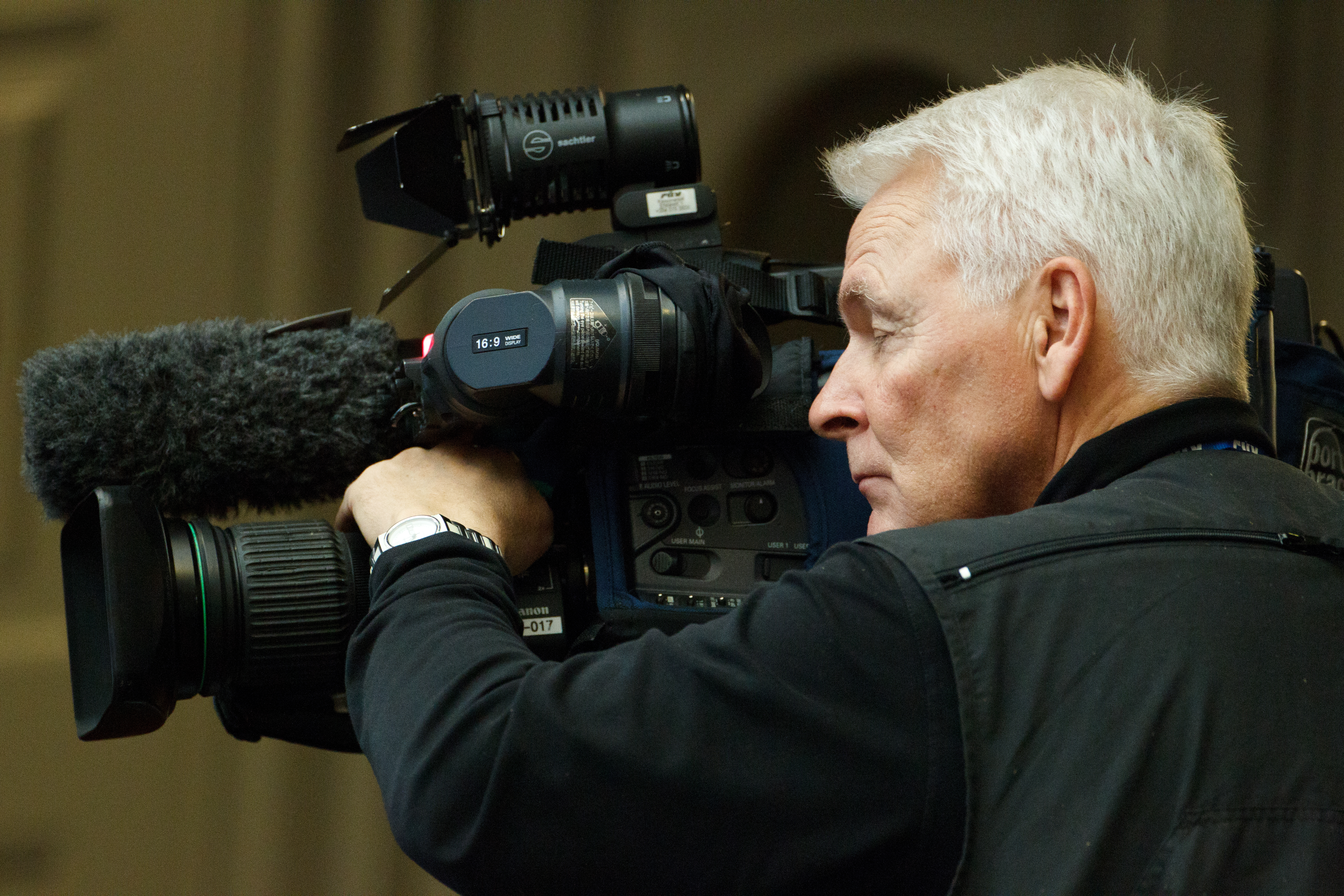 Nordiska Rådets session 2011 i Köpenhamn.